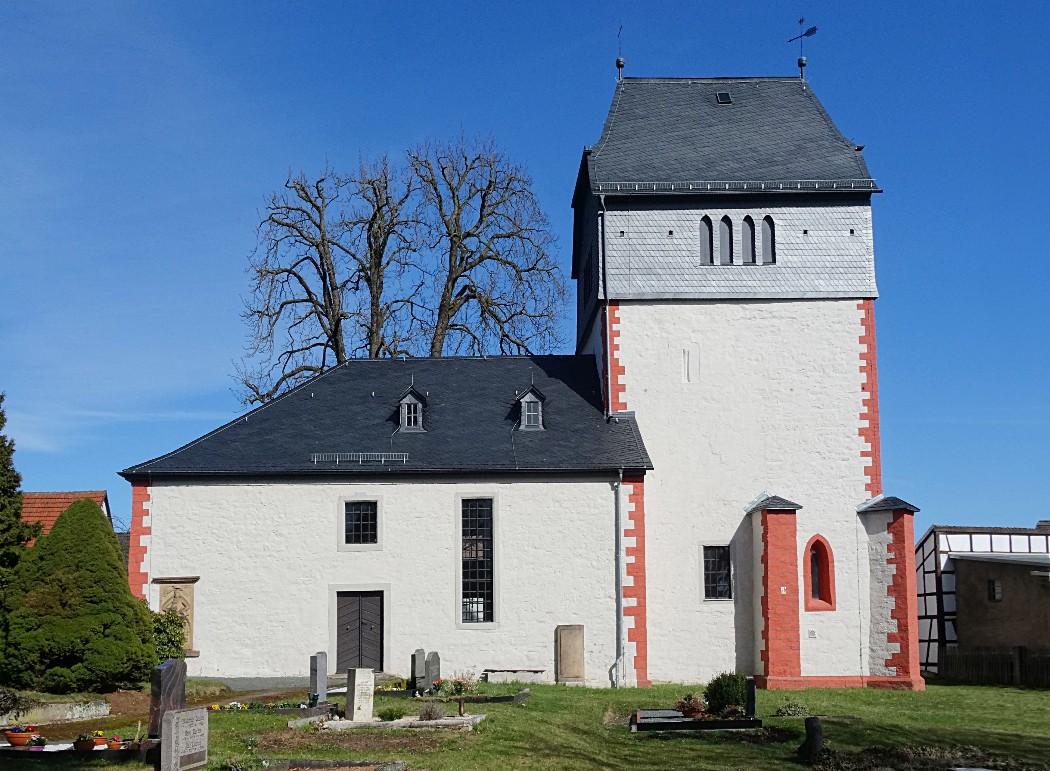 Heilig-Kreuz-Kirche - Ursprung und Wahrzeichen von Stadtroda